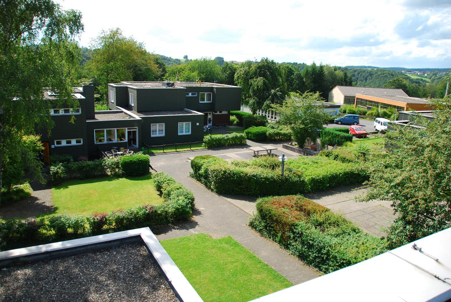 Innenhof des Internats